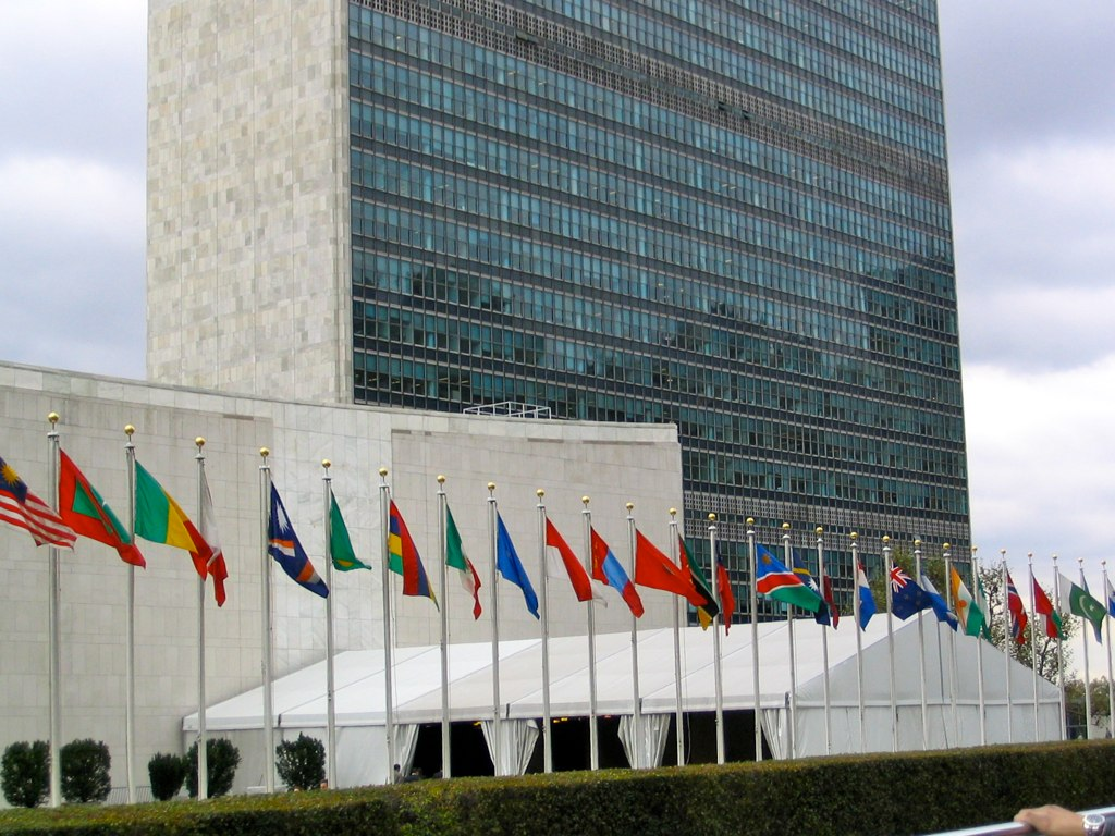 UN Flags